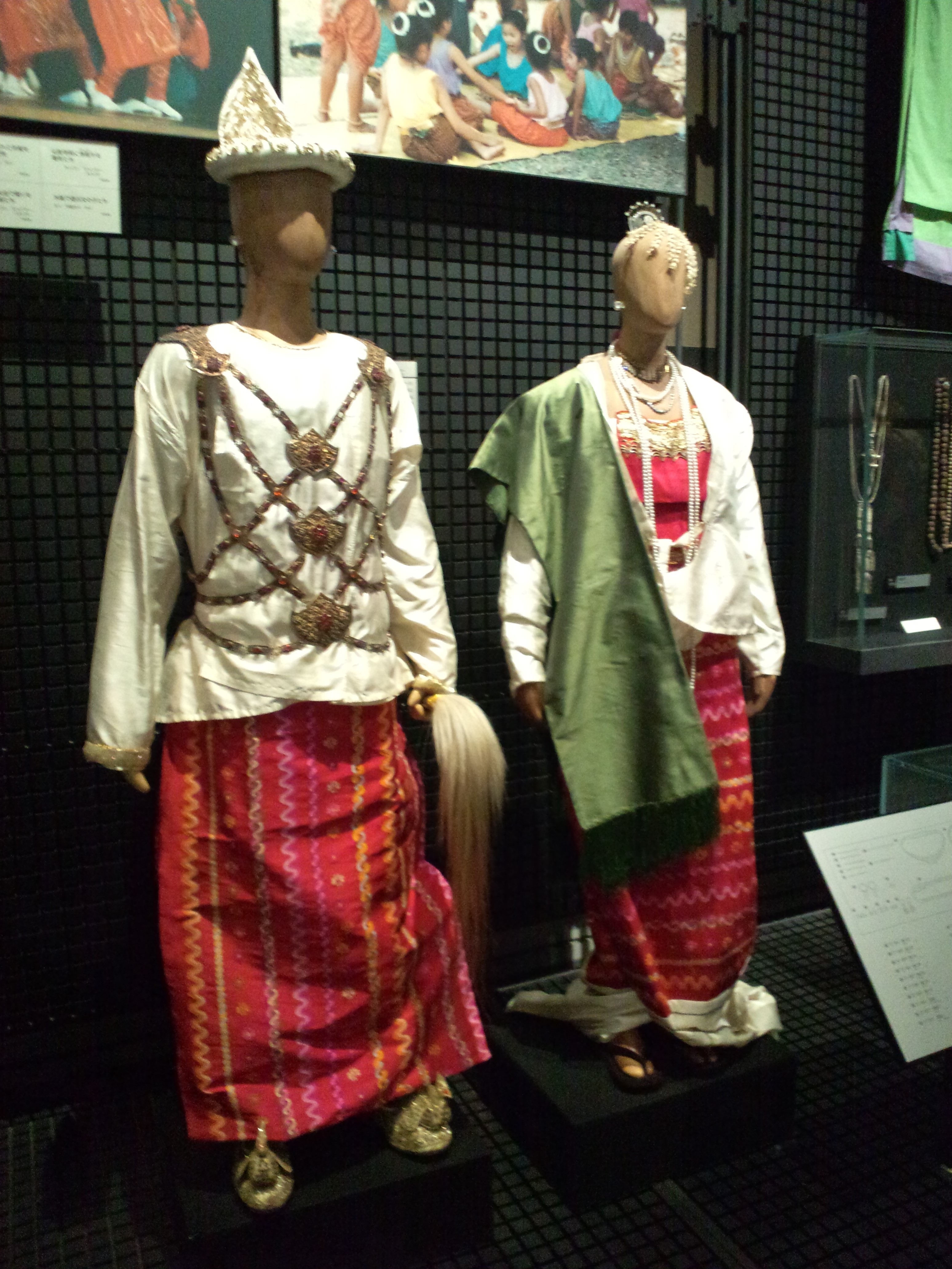 国立民族学博物館（大阪） ビルマの民族衣装（ビルマ、マンダレー、コウバウン王朝の支配者階級）